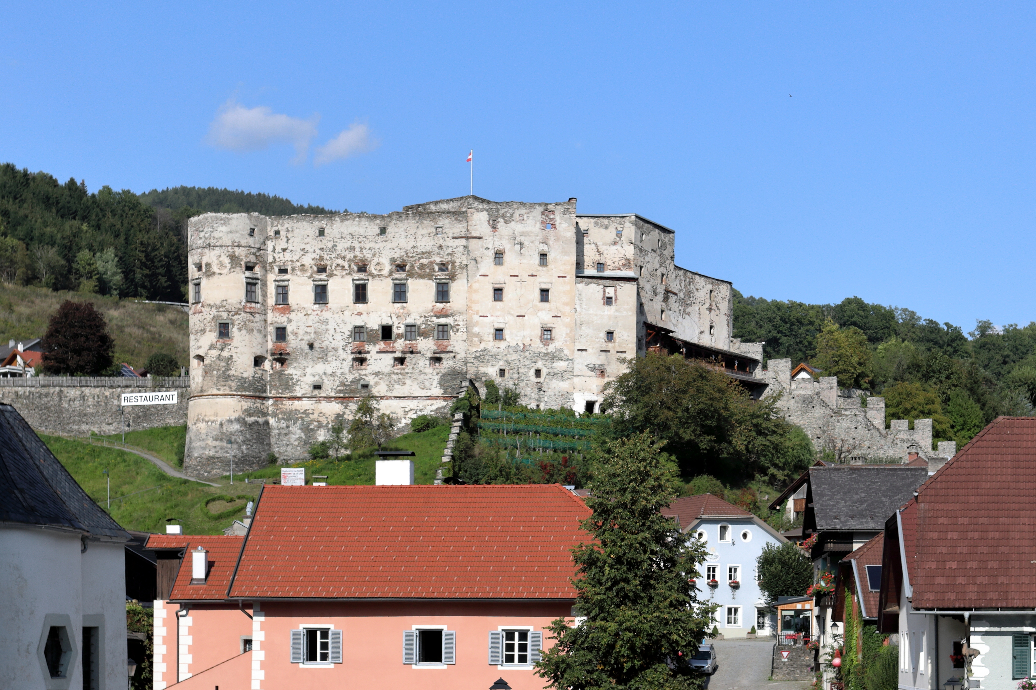 Südwestansicht der „Alten Burg“ in der österreichischen Stadtgemeinde Gmünd in Kärnten.Nach einem Brand im Jahr 1886 wurde die 1252 erstmals urkundlich erwähnte Burg dem Verfall preisgegeben. Seit 1950 ist sie im Besitz der Stadtgemeinde.